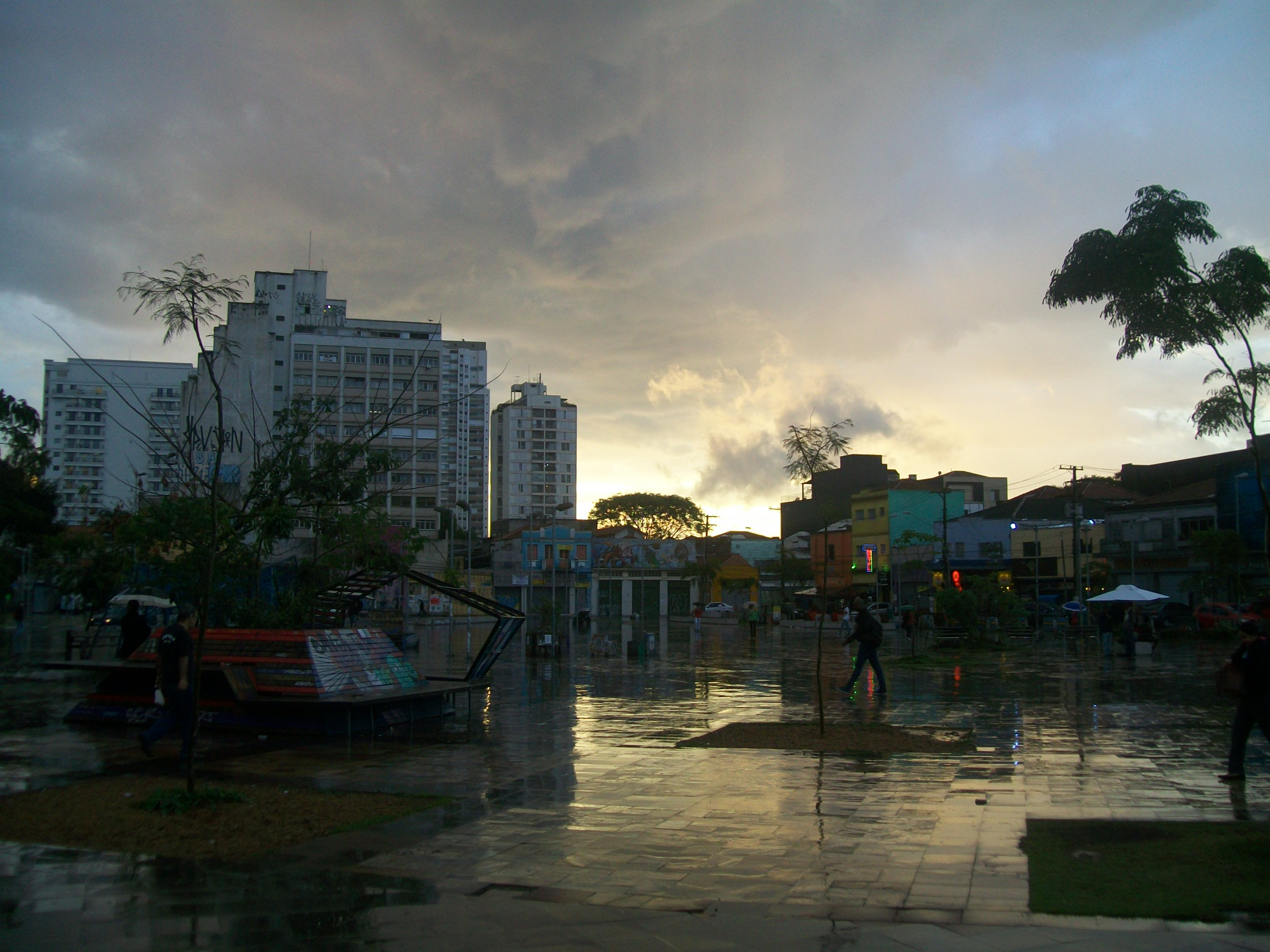 Largo da Batata, São Paulo